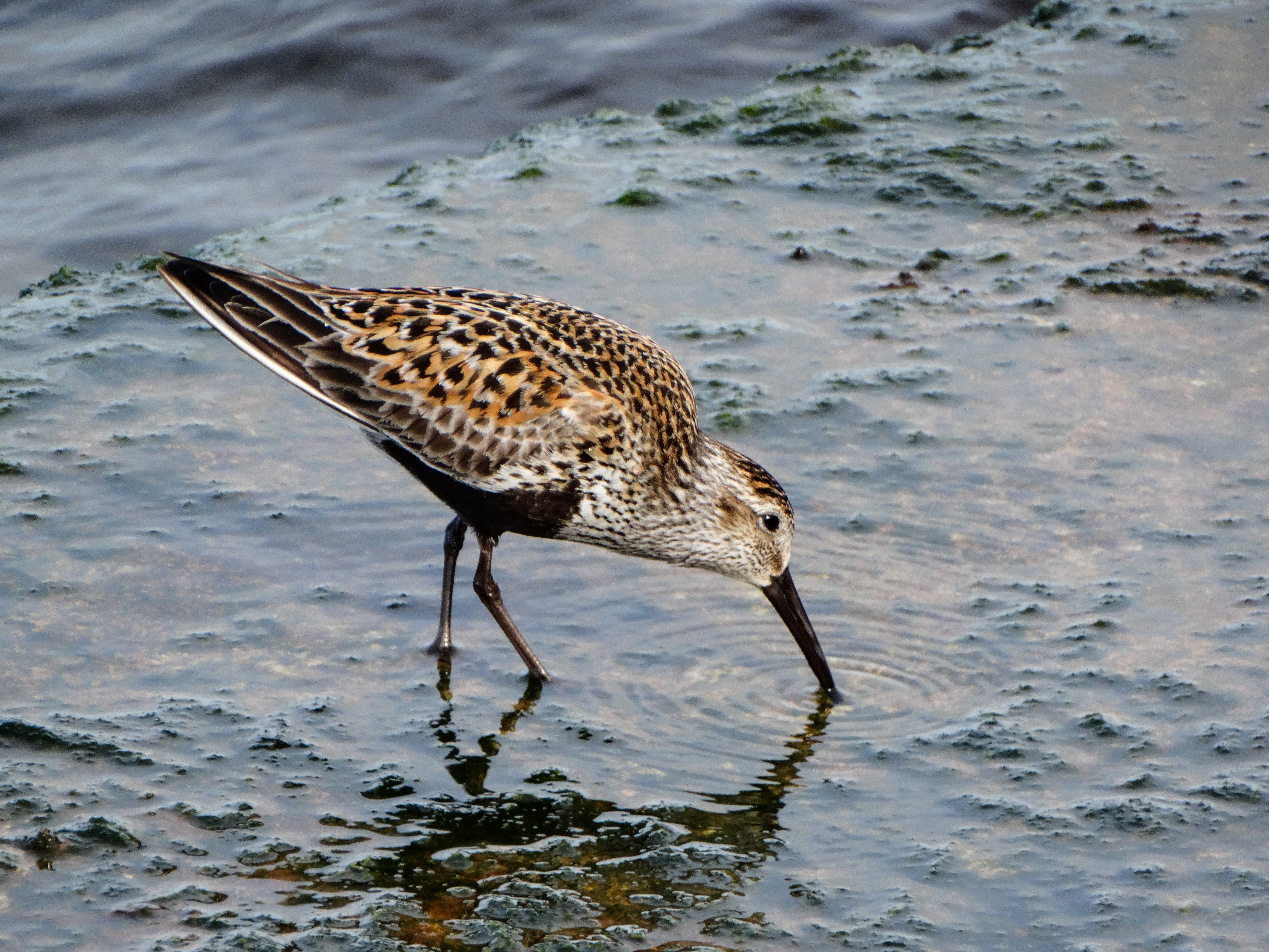 Calidris alpina alpina, adult summer plumage on autumn migration, Daugavgrīva, Riga, Latvia.